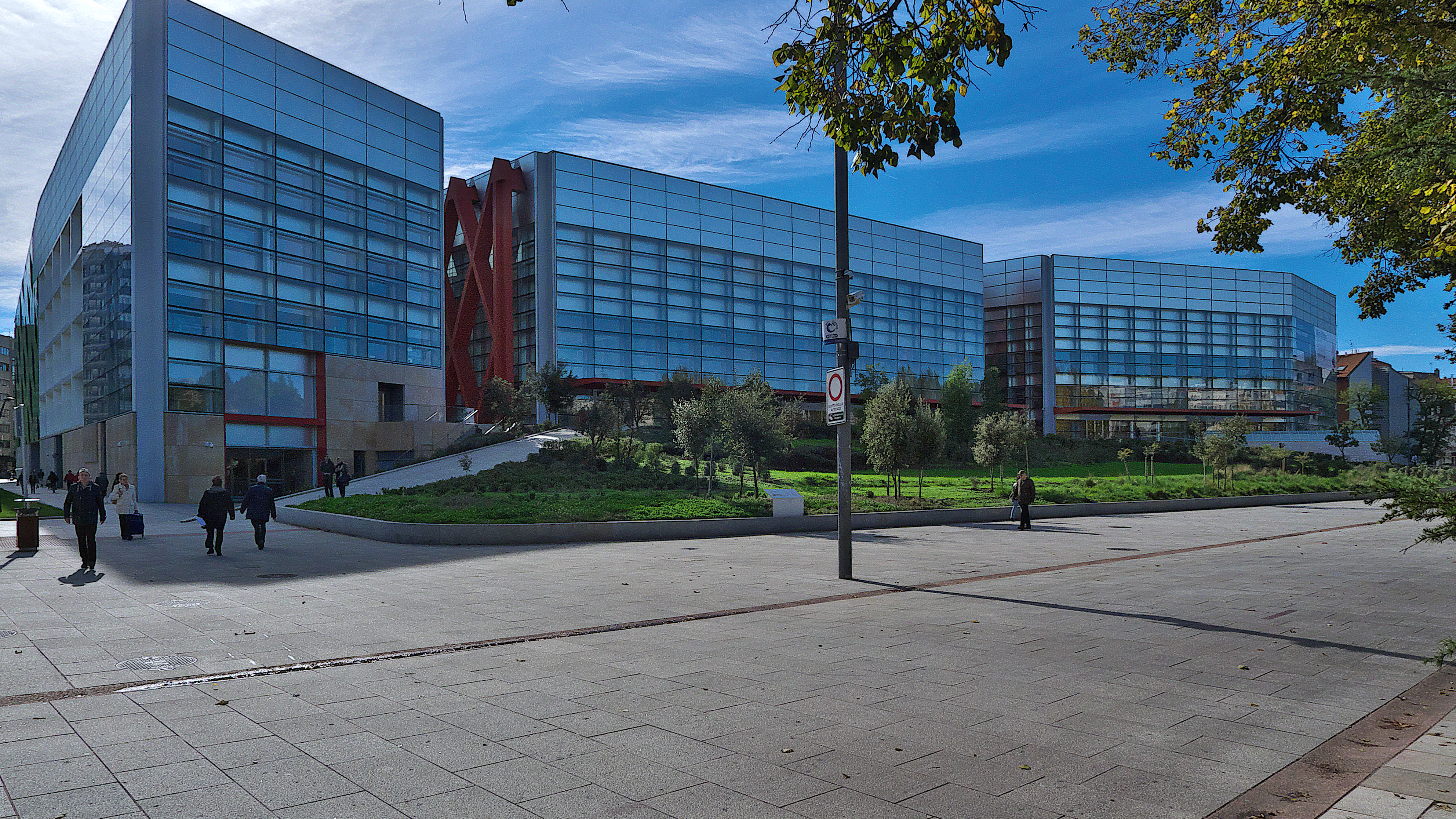 El Centro Nacional de Investigación sobre la Evolución Humana (CENIEH), el Museo de la Evolución Humana (MEH) y el Auditorio y Palacio de Congresos de Burgos (Fórum Evolución), componen este importante complejo sobre la evolución humana. Edificios proyectados por Juan Navarro Baldeweg (2009-2012)